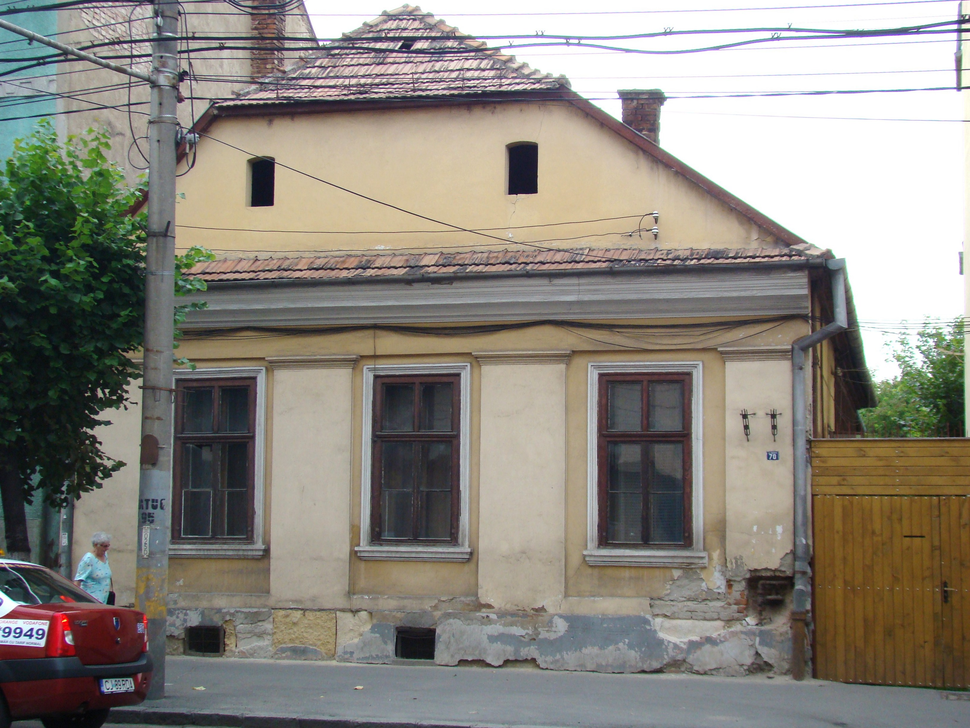 Clădire monument istoric, Calea Moților, nr. 70